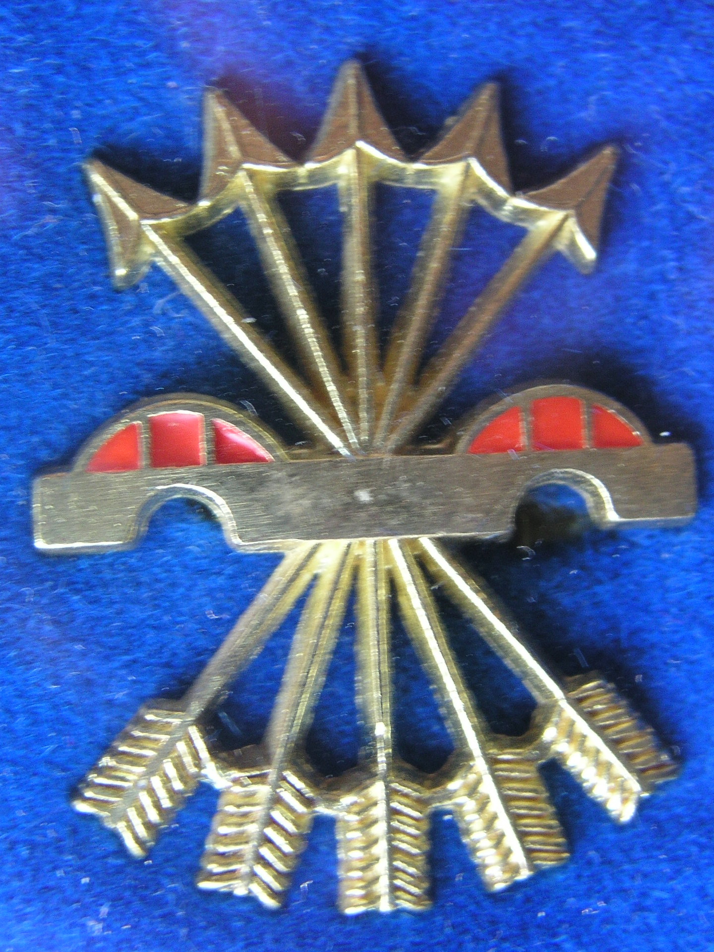 Yugo y Flechas. Emblema de pecho en metal de Falange Española. Años 1940. El emblema pertenece a un falangista que combatió en la División Azul.